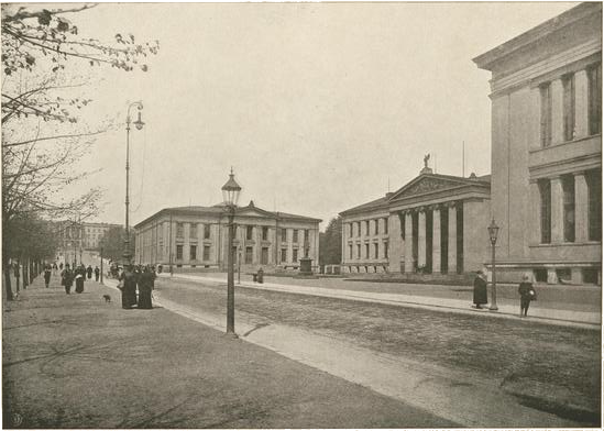 Universitetet i Kristiania. Universitetsbiblioteket holdt 1851–1912 til i bygningen nærmest Slottet (lengst til venstre).